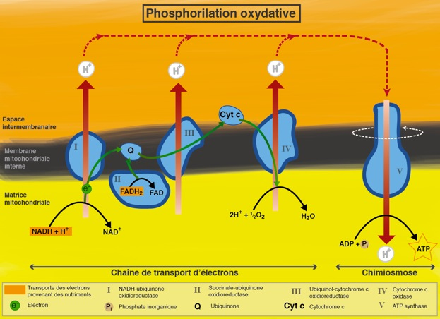 chaine de transport d'electrons/chaine respiratoire